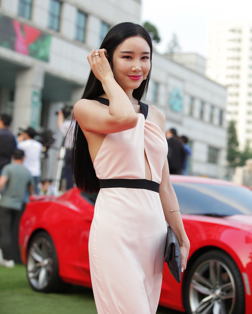 2017 부천국제판타스틱영화제(BIFAN) 레드카펫